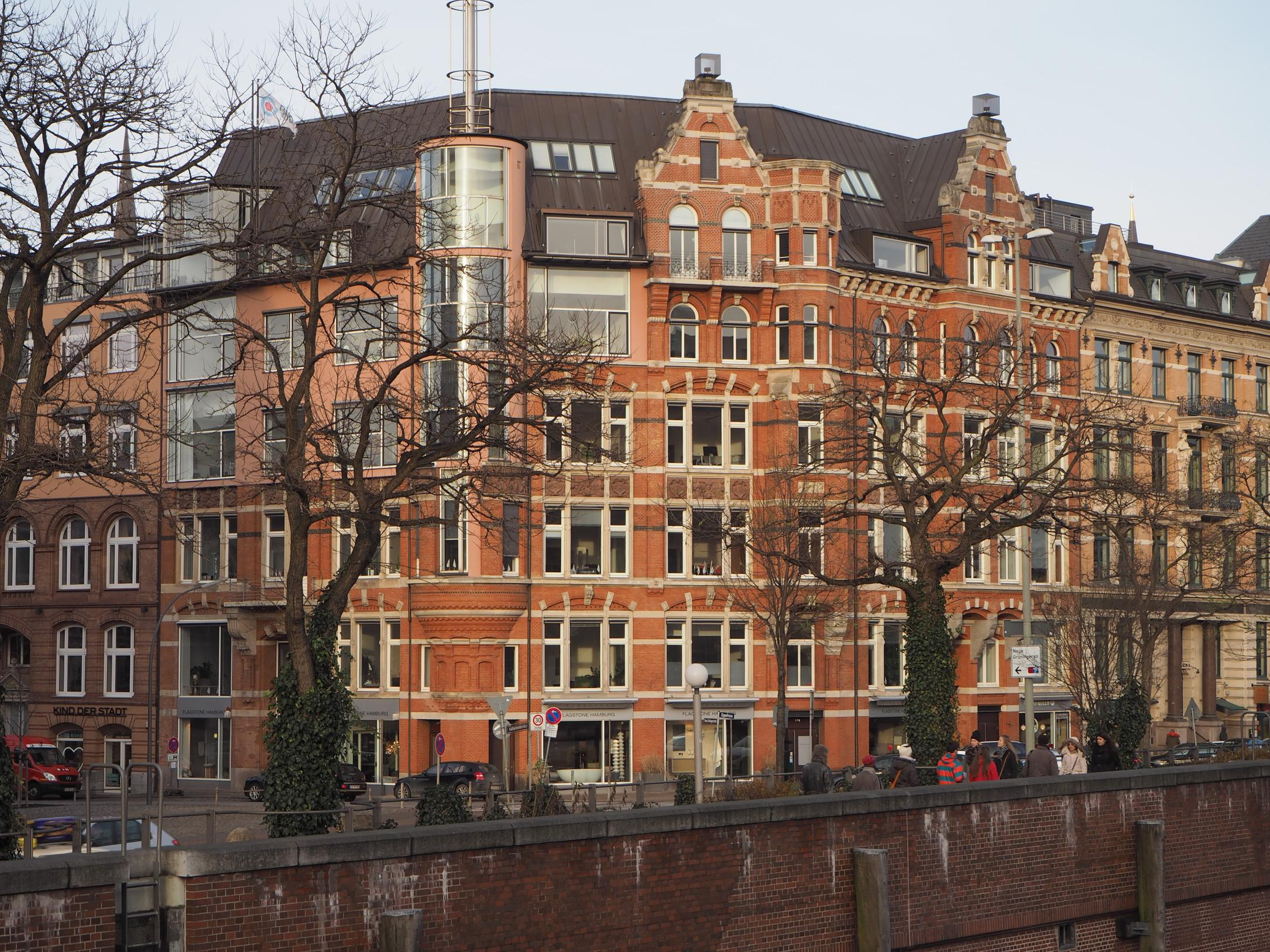 Hamburg-Altstadt, Zippelhaus, von Süden, Foto: 2015 This is a photograph of an architectural monument.